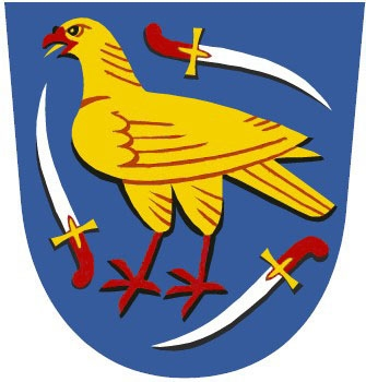 znak obce Bystřice pod Lopeníkem